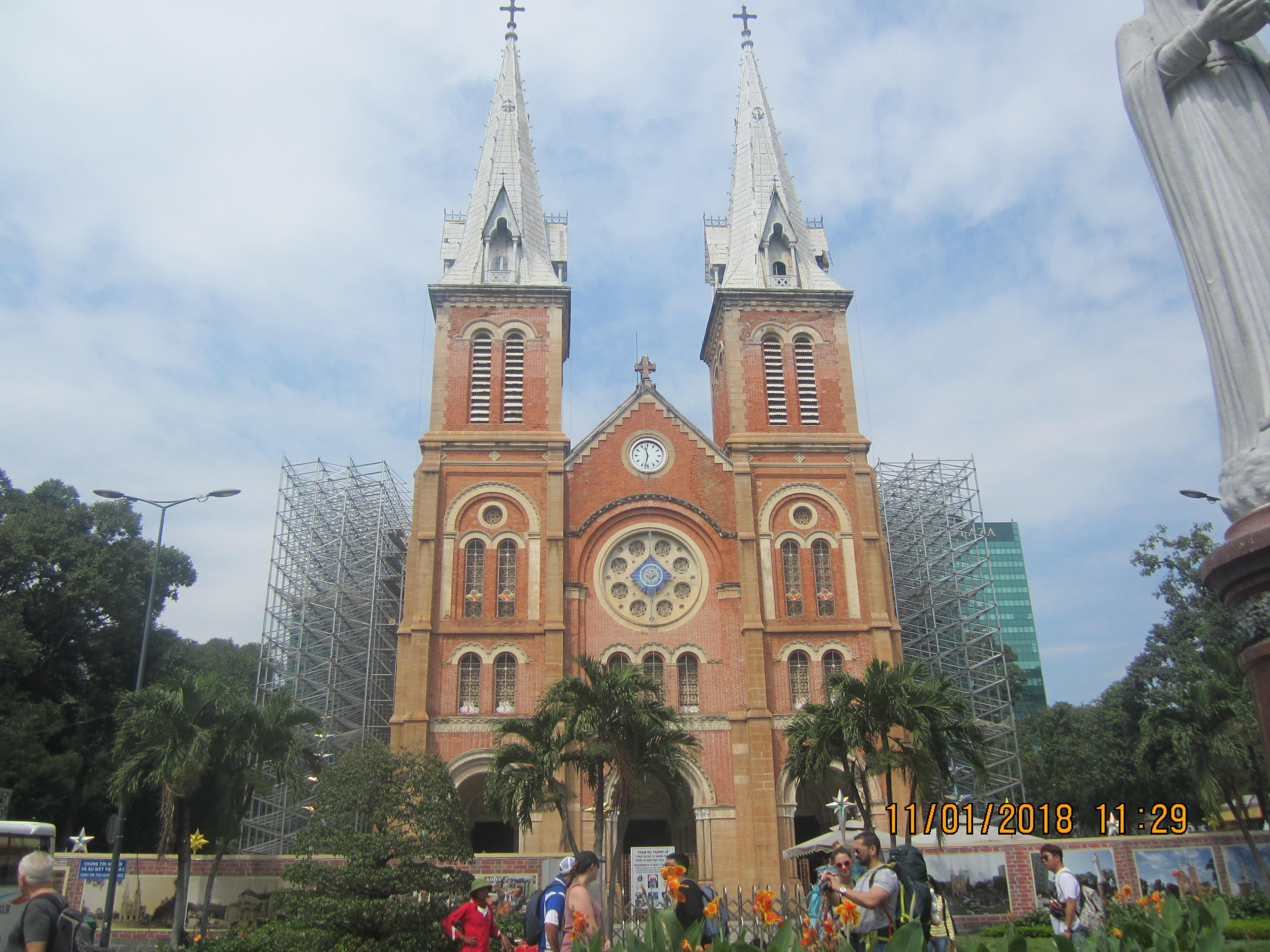 Nhà thờ Đức Bà Sài Gòn đang trùng tu